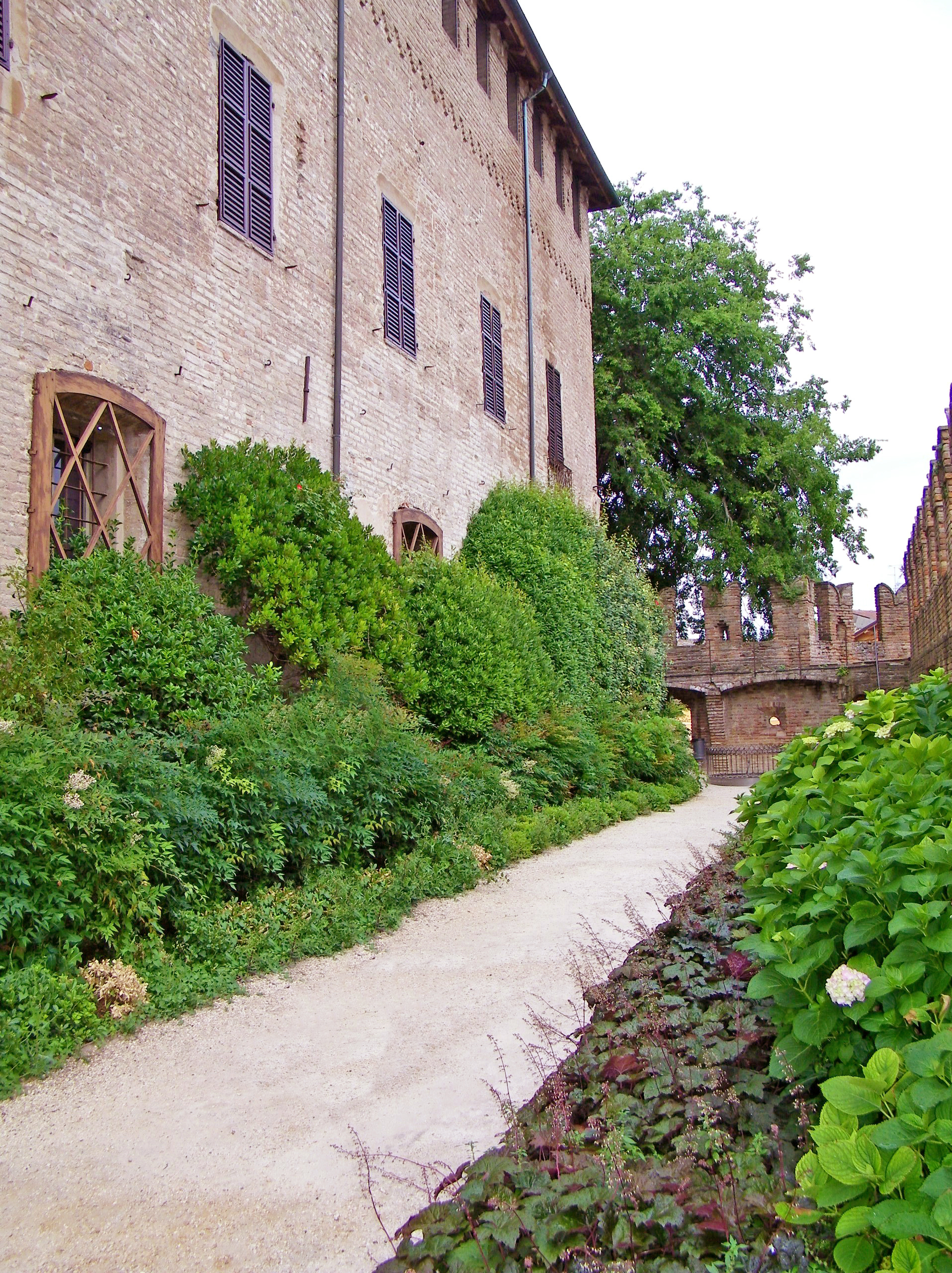 Rocca di Fontanellato (giardino pensile)